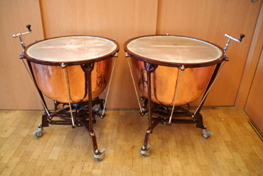 Kurbelpauken der Firma "Spenke & Metzl", Dresdner Apparatebau